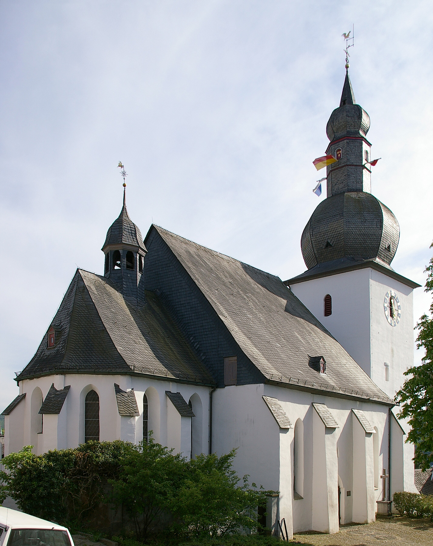 Stadtkapelle St. Georg, Alter Markt, Arnsberg, Nordrhein-Westfalen